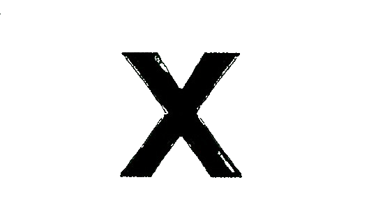 Logo del segundo álbum de Ed Sheeran